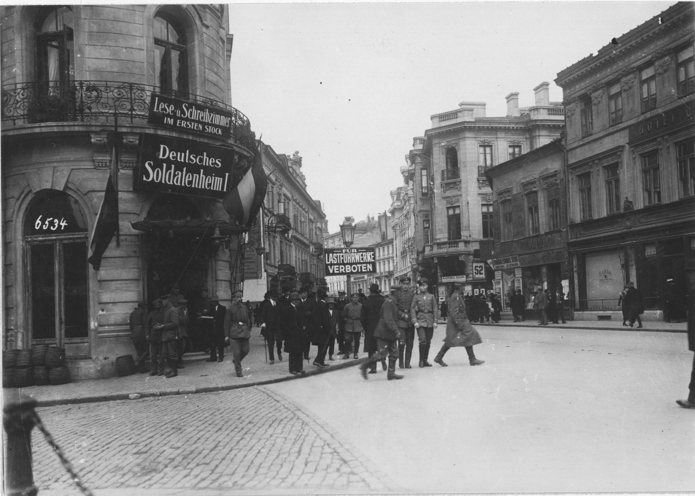 German soldiers in Bucharest (1917).